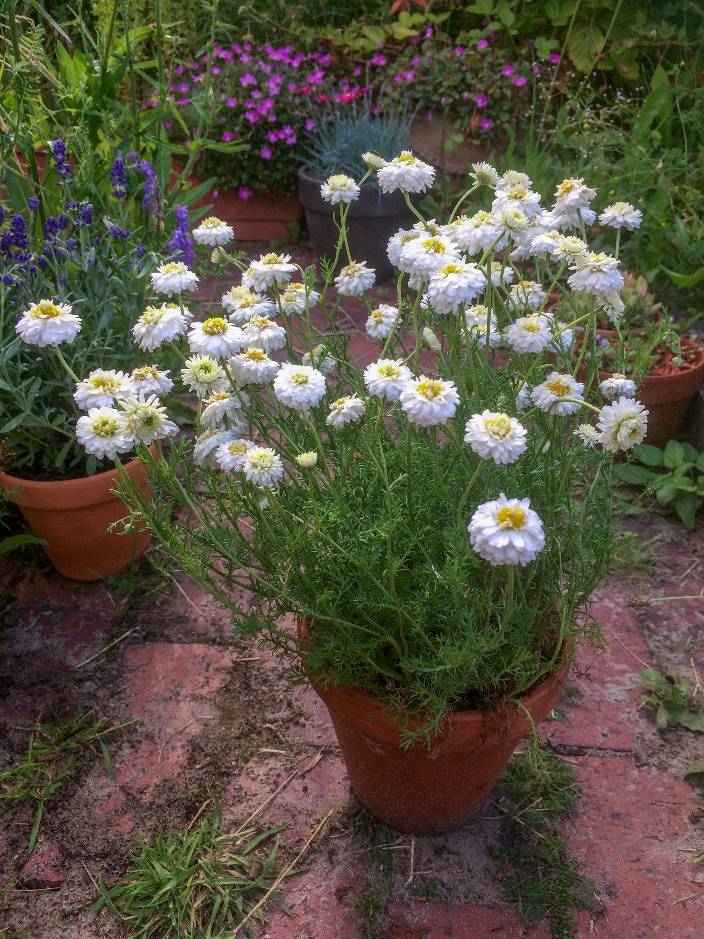 Chamaemelum nobile `Pleno` Der gefüllte Kultivar der römischen Kamille